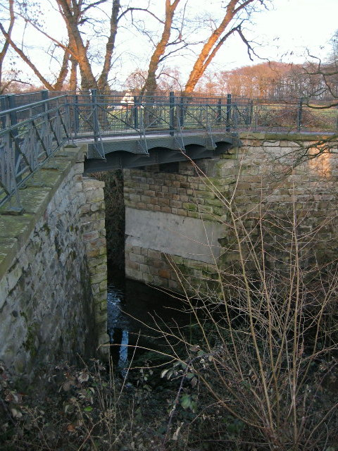 Straßenbrücke Auf der Illberg (ältere Schreibweise Auf der Ilberg) über die in diesem Abschnitt vernässte Trasse der Bahnstrecke Schee–Silschede; Baudenkmal Nr. 68 „Brücke über die ehemalige Kohlenbahn“ in Gevelsberg-Silschede This is a photograph of an architectural monument.